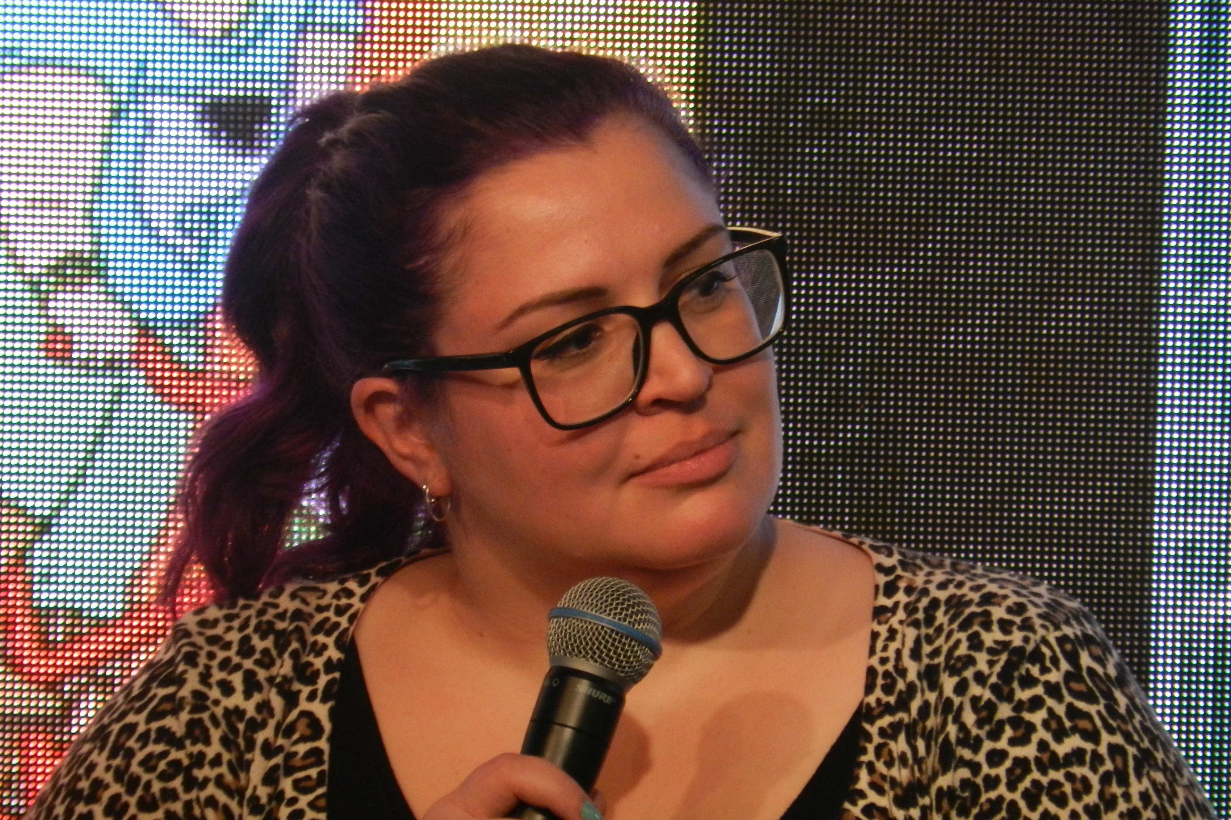 Julia Skott på Bokmässan i Göteborg 2017.